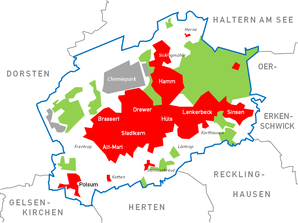 Übersichtskarte der Stadt Marl - Marl, Nordrhein-Westfalen, Deutschland